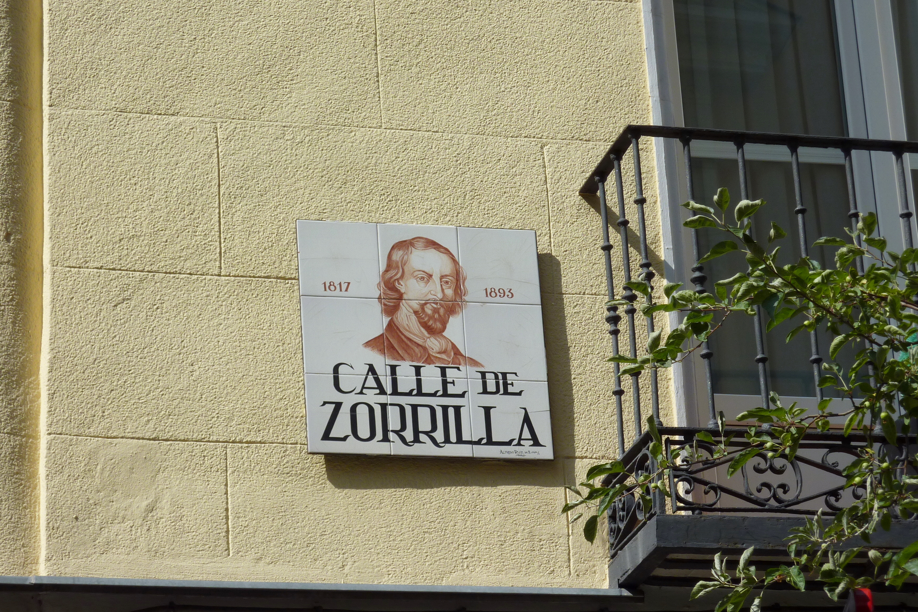 Straßenschild: Calle de Zorilla, in Madrid (Spanien), benannt nach José Zorrilla y Moral, mit Signatur von Alfredo Ruiz de Luna González